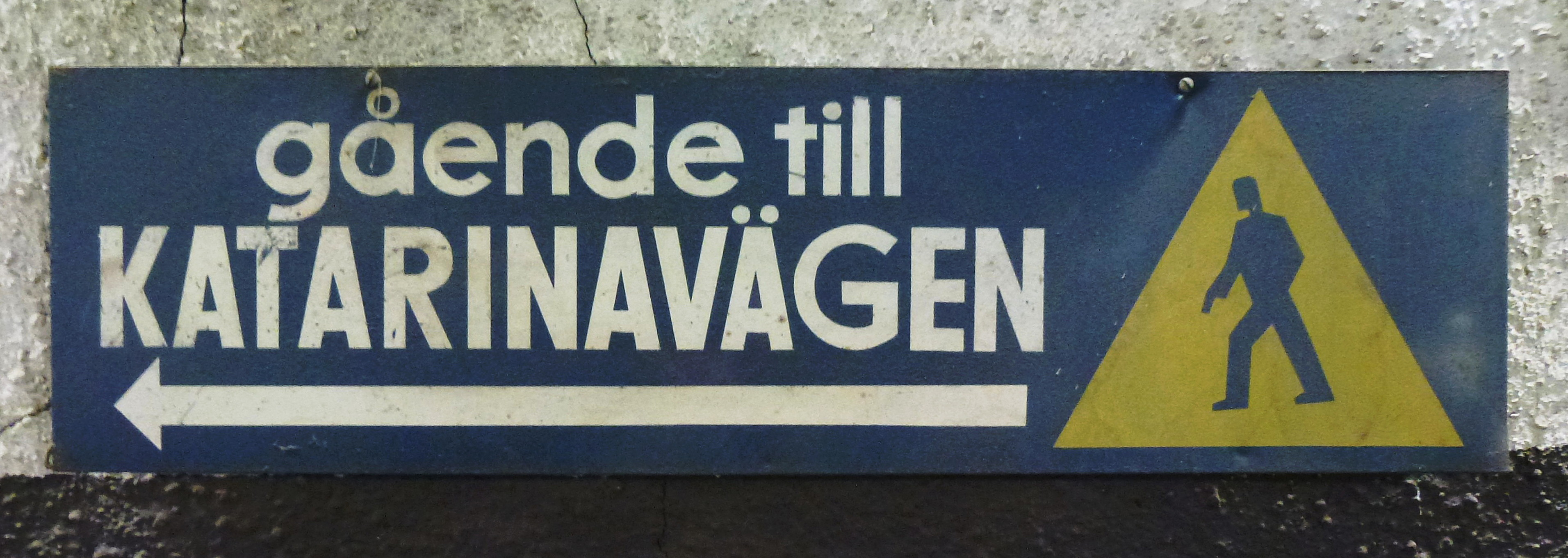 Katarina skyddsrum, skylt för gående